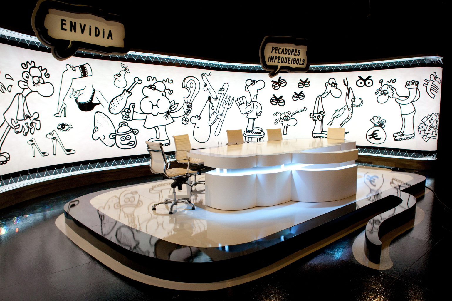 El decorado con una lona con dibujos de Forges y la mesa con la forma de sus bocadillos